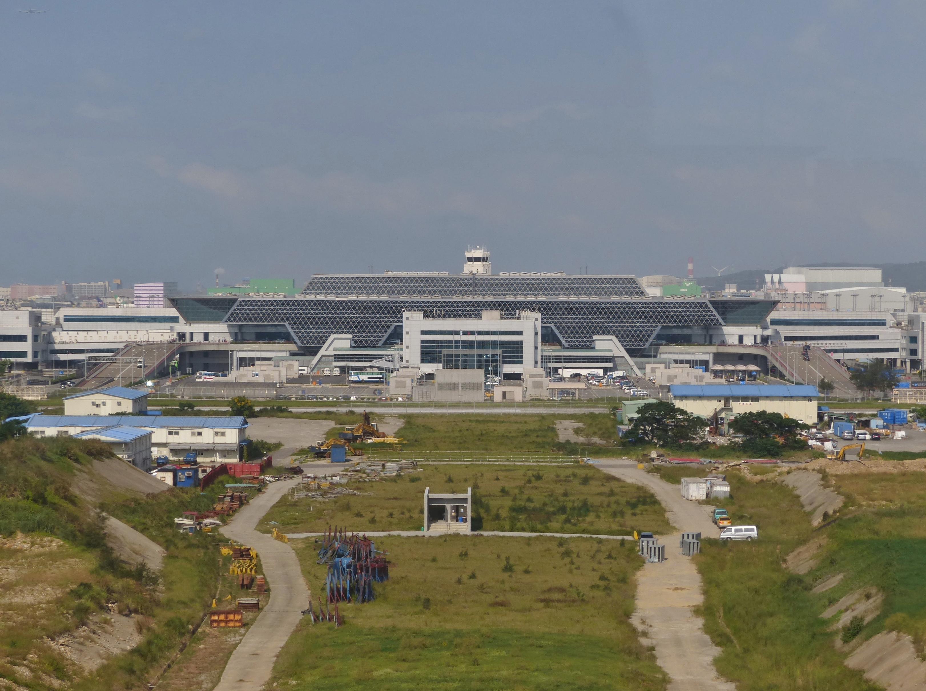 由航科館瞭望塔俯望桃園國際機場第二航站正面。